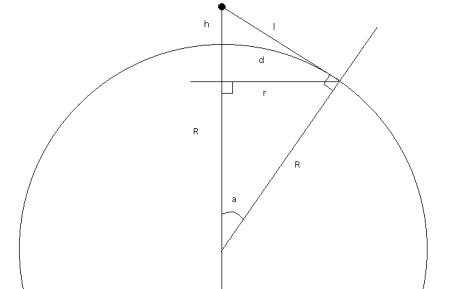 Schéma de la position de l'observateur par rapport à la terre